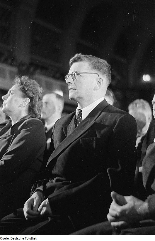 Original image description from the Deutsche Fotothek Portrait Dmitri Dmitrijewitsch Schostakowitchs sowie Lotte Ulbrichts im Publikum der Bachfeier